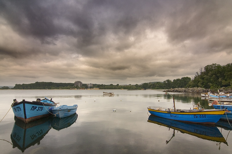 Port of Primorsko